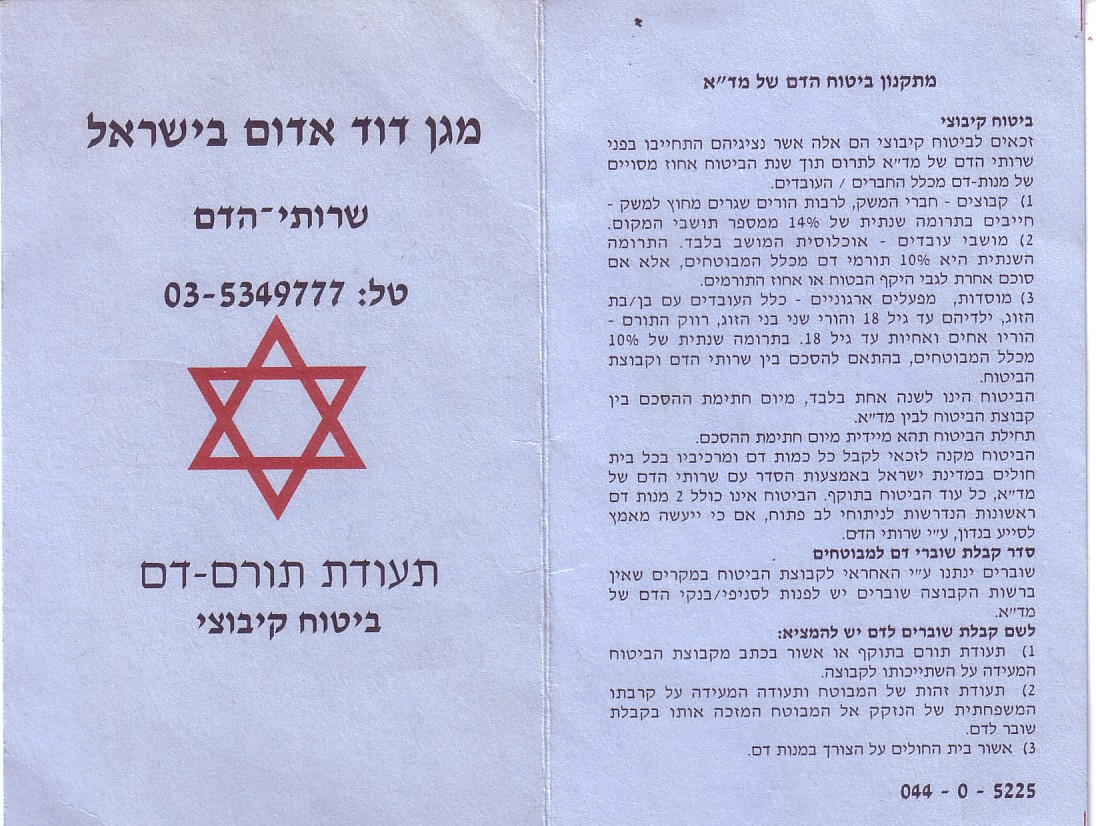 מד"א, תעודת תורם דם, ביטוח קיבוצי